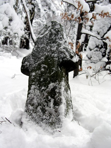 Brenna, kamienny krzyż pokutny z 1696 roku na stoku góry Łazek w przysiółku Barujec